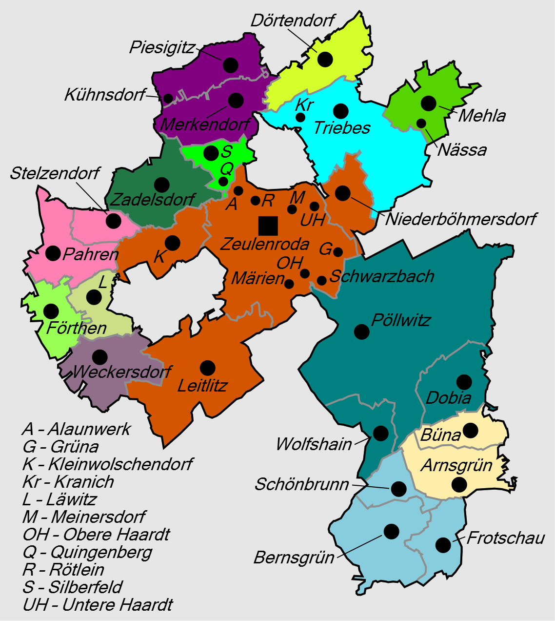 Gliederung der Stadt Zeulenroda-Triebes ab 14. Juli 1993